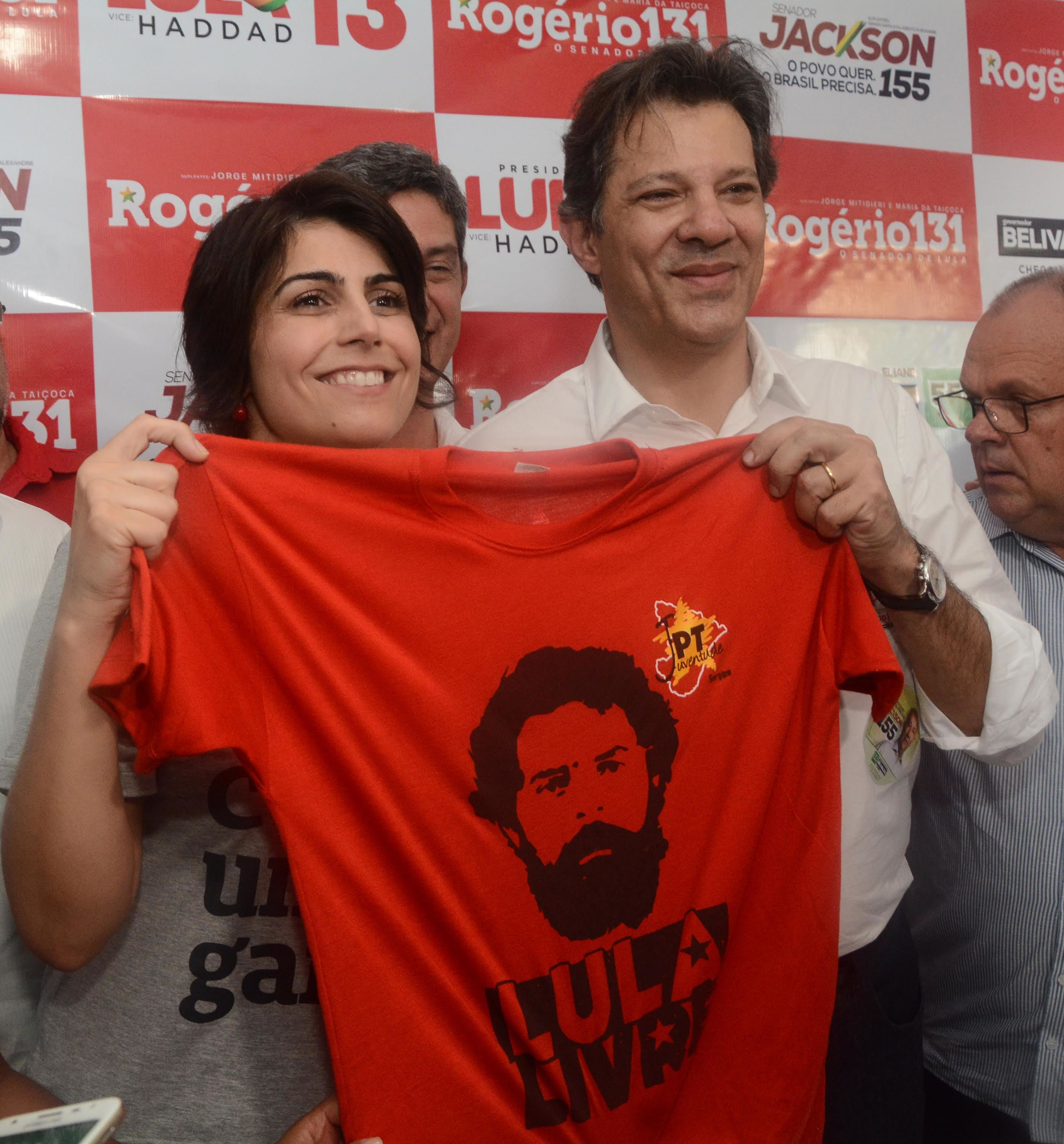 Chapa o povo feliz de novo em Aracaju